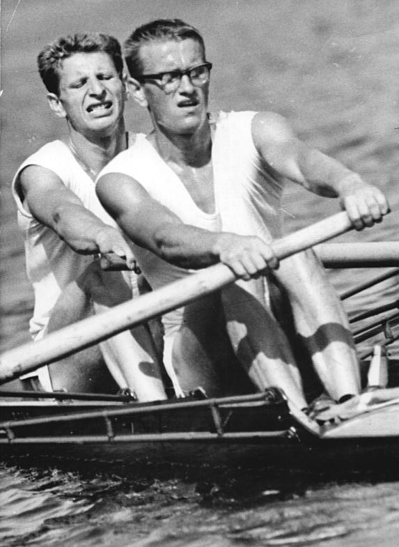 Joachim Böhmer, Peter Schulz Zentralbild Kohls 12.8.62 Deutsche Rudermeisterschaften 1962 am 11. und 12.8.62 auf dem Templiner See bei Potsdam. UBz: Deutscher Meister im Zweier ohne Steuermann wurden mit einer großartigen Leistung Joachim Böhmer und Peter Schulz (beide Dynamo Berlin).